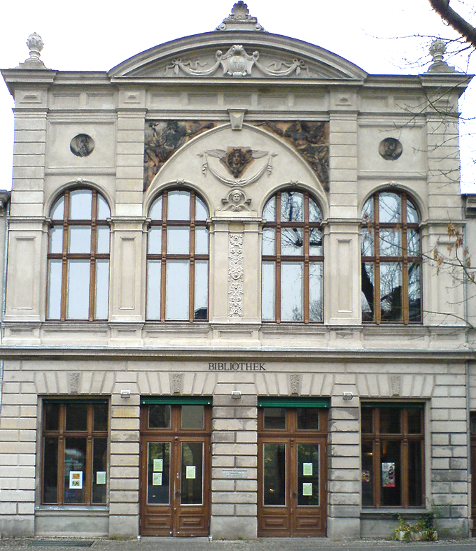 Die Bibliothek am Luisenbad. / Luisenbad Library